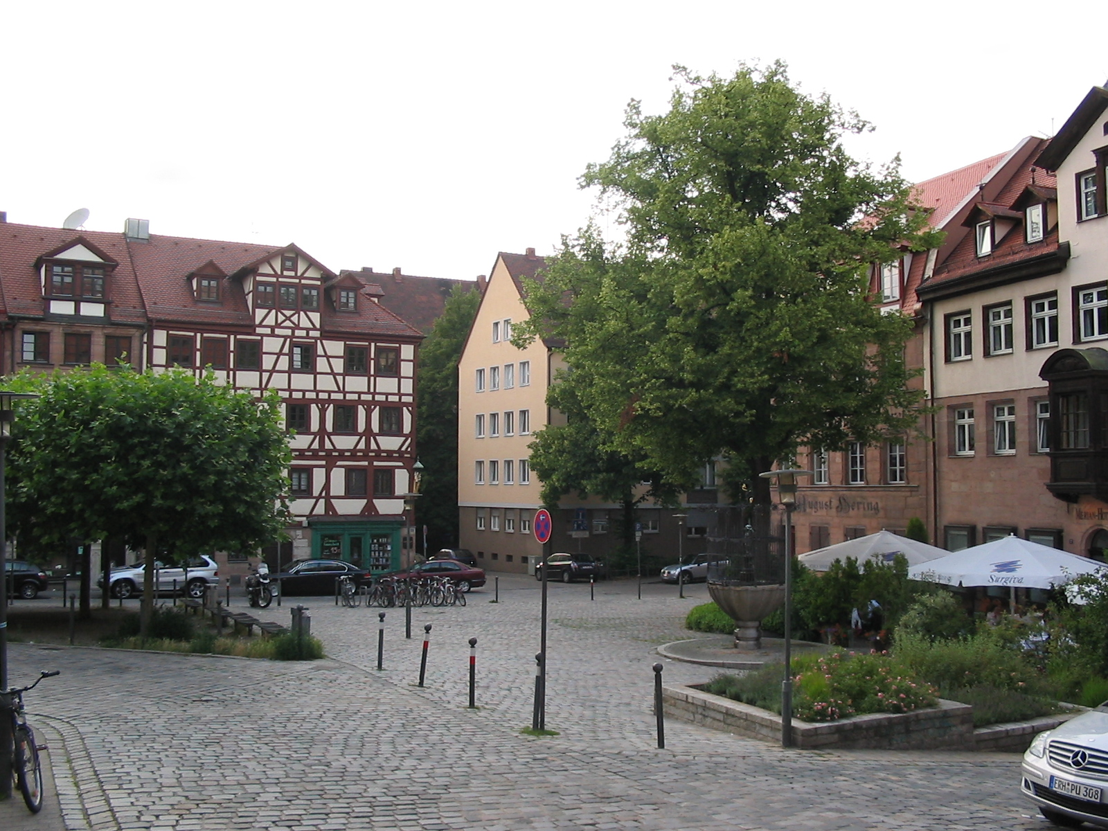 Der Unschlittplatz in Nürnberg. Vor dem Haus Nr. 8 in der Bildmitte tauchte am 28.05.1828 Kaspar Hauser auf.